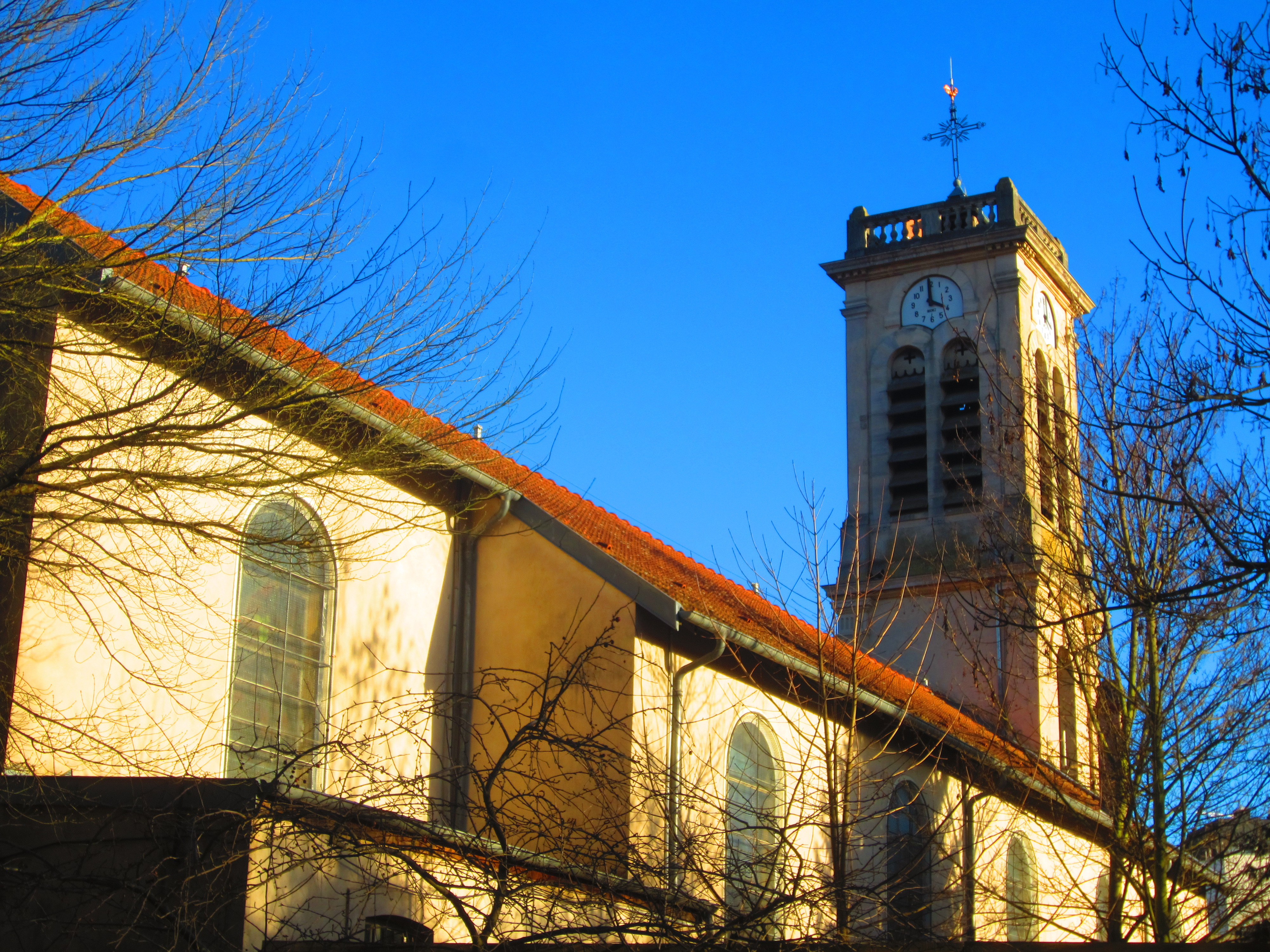 Nancy eglise Saint- vincent-de-paul arrière